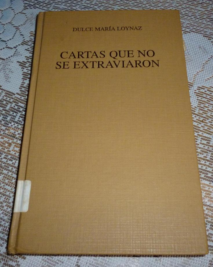 Uno de los libros dedicados al amplio Epistolario de la escritora Dulce María Loynaz.